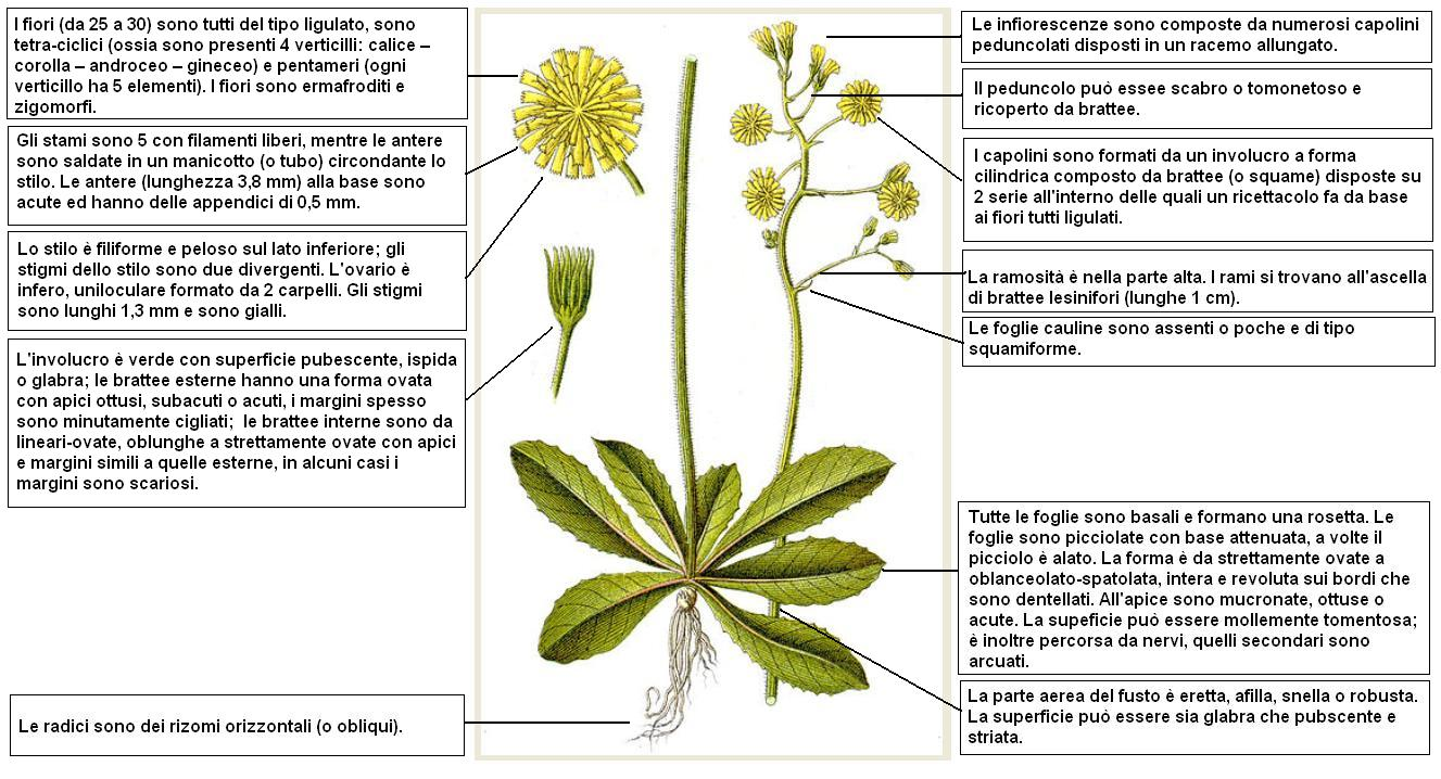 Crepis praemorsa - Descrizione della pianta